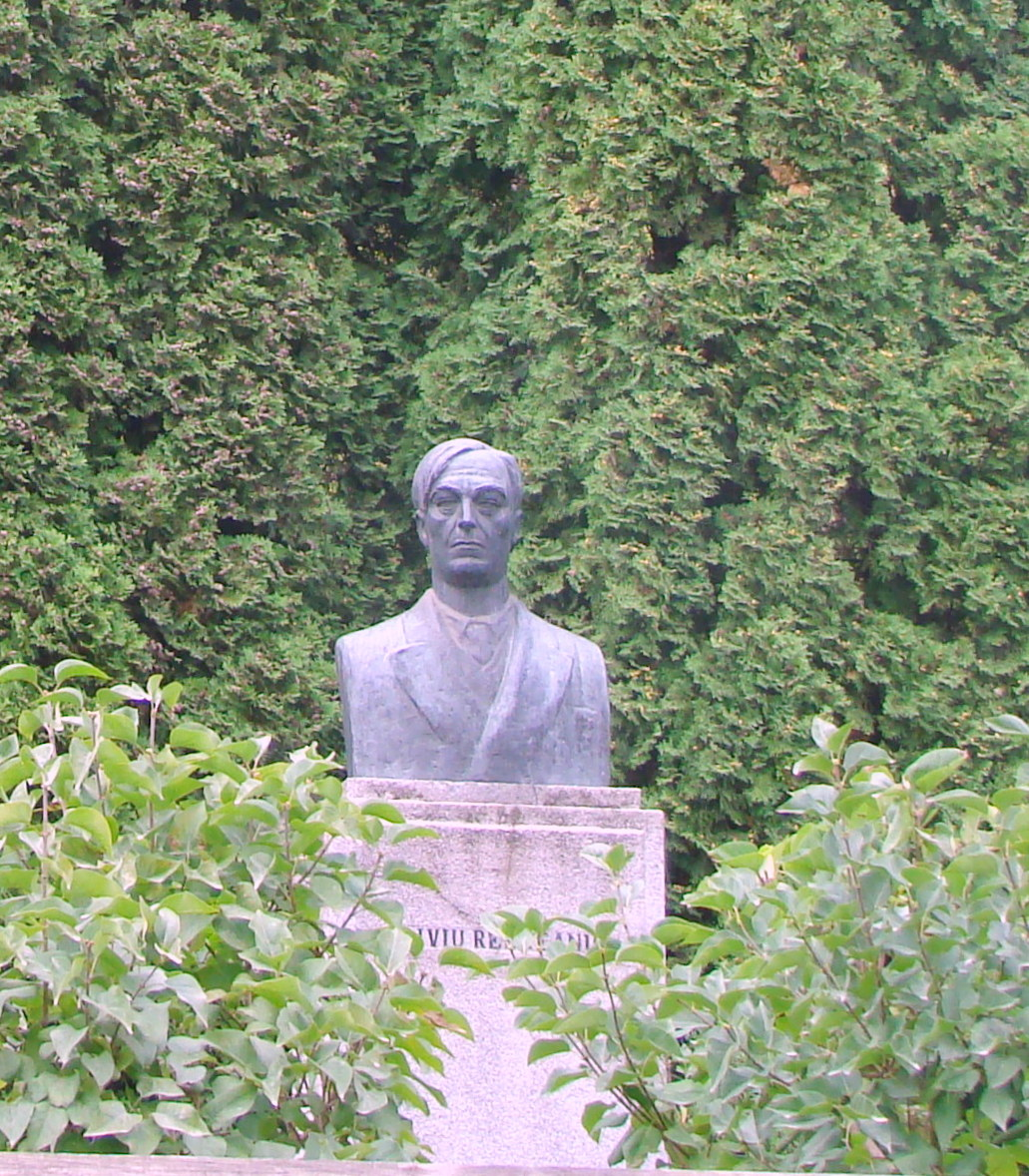 Bustul lui Liviu Rebreanu, localitate componentă Liviu Rebreanu; oraș Năsăud